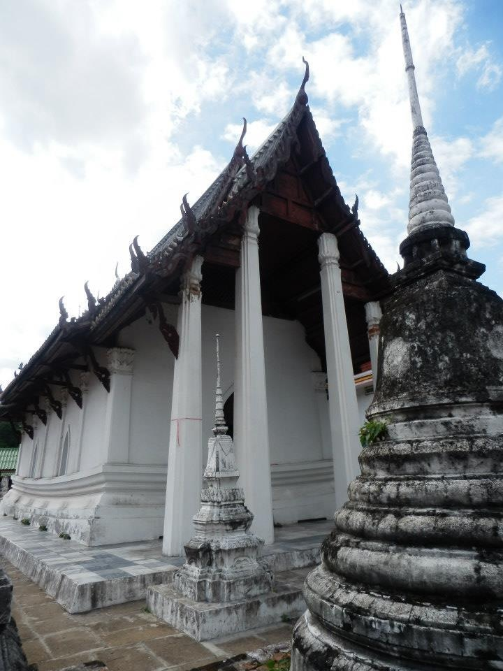 วัดช่องนนทรีเป็นวัดสมัยอยุธยาตอนปลาย อยู่ติดริมแม่น้ำเจ้าพระยาทางฝั่งตะวันออก หน้าวัดหันไปทางทิศตะวันออกเช่นกัน เพราะเป็นช่วงที่แม่น้ำไหลวกขึ้นเหนือ ตรงข้ามกับบริเวณฝั่งบางกะเจ้า สิ่งก่อสร้างที่สำคัญคือพระอุโบสถฐานเป็นโบสถ์แอ่นท้องสำเภา มีขนาด ๕ ห้อง ๒ มุข ลักษณะคล้ายโบสถ์มหาอุตม์ ด้านหน้าพระอุโบสถทำเป็นมุขเด็จ มีเสาหารรองรับเครื่องบนหลังคาสี่ต้น หน้าบันทำเป็นฝาปะกนไม่สลักลวดลาย หลังคาเป็นลอนมุงกระเบื้องแล้วฉาบปูนติดเชิงชาย ด้านหน้าโบสถ์มีเจดีย์และใบเสมาเรียง-รายกันอยู่ ด้านในประดิษฐานพระพุทธรูปปูนปั้นปางมารวิชัยเป็นพระประธาน ลดหลั่นด้วยพระพุทธรูปสี่องค์ที่จัดวางตำแหน่งได้อย่างน่าชม โดยจัดวางเป็นคู่ๆเยื้องกันออกมา ที่ฐานองค์พระมีลายปูนปั้นที่งดงามเช่นกัน โดยออกแบบขาสิงห์เป็นรูปครุฑได้อย่างสวยงาม ในพระอุโบสถมีภาพจิตรกรรมฝาผนัง เล่าเรื่องทศชาติชาดก เริ่มตั้งแต่ผนังด้านซ้ายของพระประธาน เวียนอุตราวัตรไปจนคบสิบเรื่อง บริเวณผนังสกัดหน้าเหนือช่องประตูเขียนภาพมารผจญ ภาพเขียนที่วัดช่องนนทรีนี้นับเป็น ภาพเขียนสมัยอยุธยาที่ที่ยังหลงเหลือสมบูรณ์ที่สุดแห่งหนึ่ง ซึ่งอาจร่วมสมัยกับภาพเขียนที่วัดปราสาท นนทบุรี ภาพเขียนชุดนี้เป็นงานจิตรกรรมก่อนรัชสมัยพระเจ้าอยู่หัวบรมโกศ ซึ่งเป็นยุคที่งานละครหนังใหญ่เจริญรุ่งเรือง ทำให้งานเขียนได้รับแนวทางจากท่าทางของนาฏลักษณ์ ตามการสันนิษฐานของอาจารย์ น ณ ปากน้ำ ภาพเขียนที่นี่เขียนด้วยเนื้อหาที่สอดแทรกวิถีชีวิต เป็นการเก็บภาพประวัติศาสตร์ผ่านชาดกในพระพุทธศาสนา ไม่ว่าจะเป็นงานสถาปัตยกรรม ศิลปะวัตถุ เครื่องใช้ การแต่งกาย ไปจนถึงภาพขบวนเสด็จพยุหยาตราทางสถลมารค นอกจากนี้ยังมีการเขียนภาพธรรมชาติ ที่เกิดจากความคิดในอุดมคติ ที่ดูพริ้วไหวมีชีวิตชีวาลงตัวกับองค์ประกอบอื่นๆไปจนถึงสัตว์เล็กสัตว์น้อย ที่ศิลปินได้สอดแทรกเรื่องราวเอาไว้ได้อย่างลงตัว ภาพเขียนที่วัดช่องนนทรีถึงแม้จะเป็นภาพเขียนที่ใช้สีน้อยกว่าภาพเขียนในยุคหลัง แต่การจัดวางองค์ประกอบและลายเส้นที่งดงามเป็นธรรมชาติ ก็ทำให้ภาพดูมีชีวิตชีวาขึ้นมาได้อย่างน่าชื่นชม